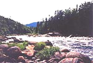 LA RIVIÈRE DES PRAIRIES JADIS - Photo d'une rivière du Nord de Montréal.